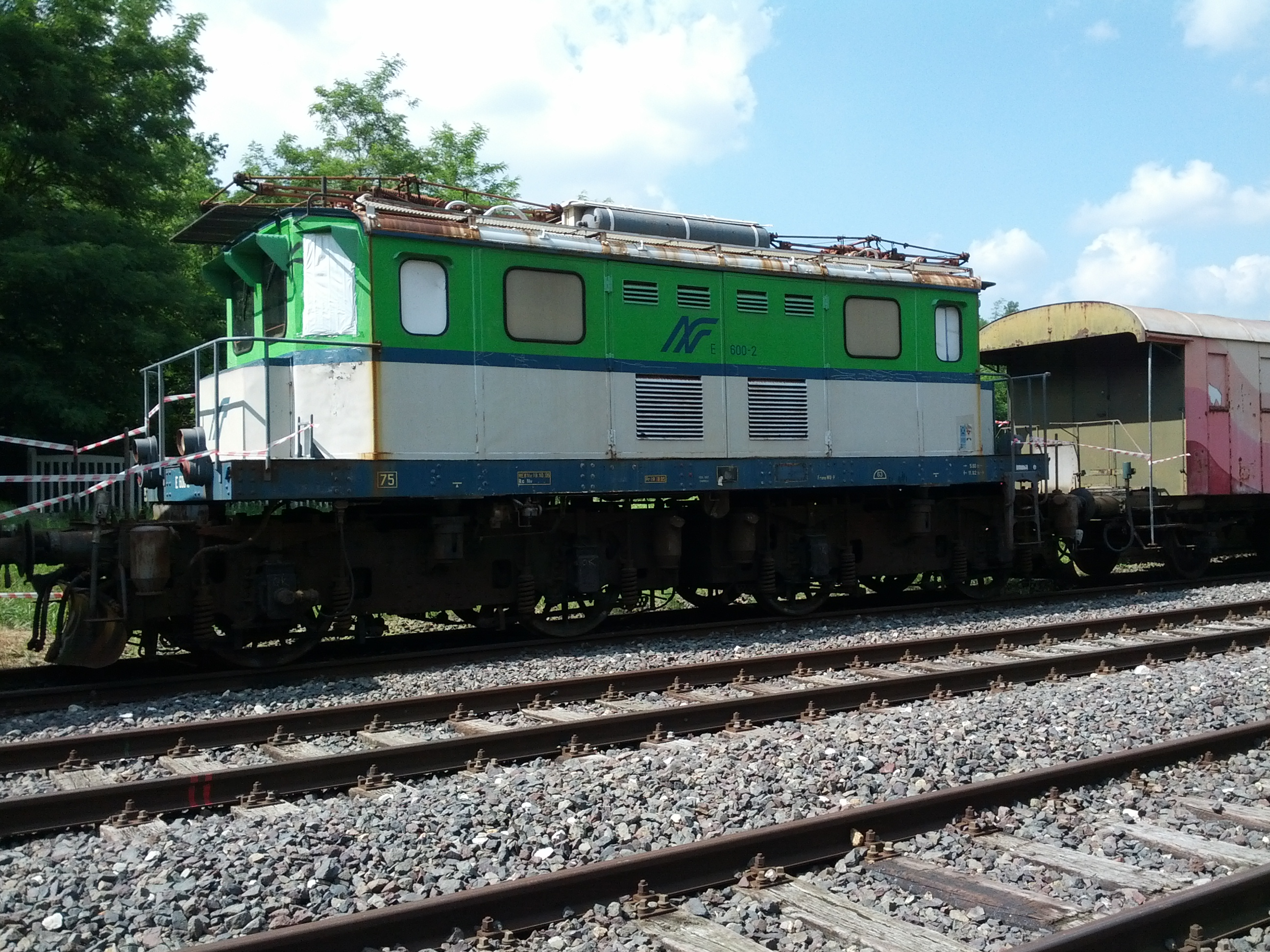 Locomotiva elettrica E.600-2 delle Ferrovie Nord Milano.